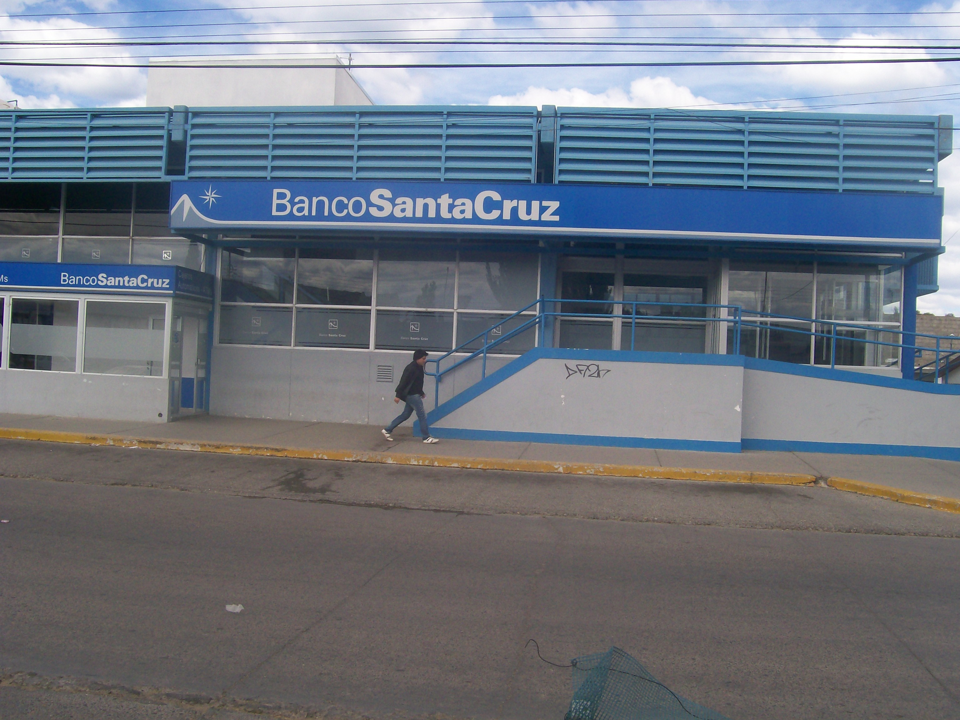 foto del banco